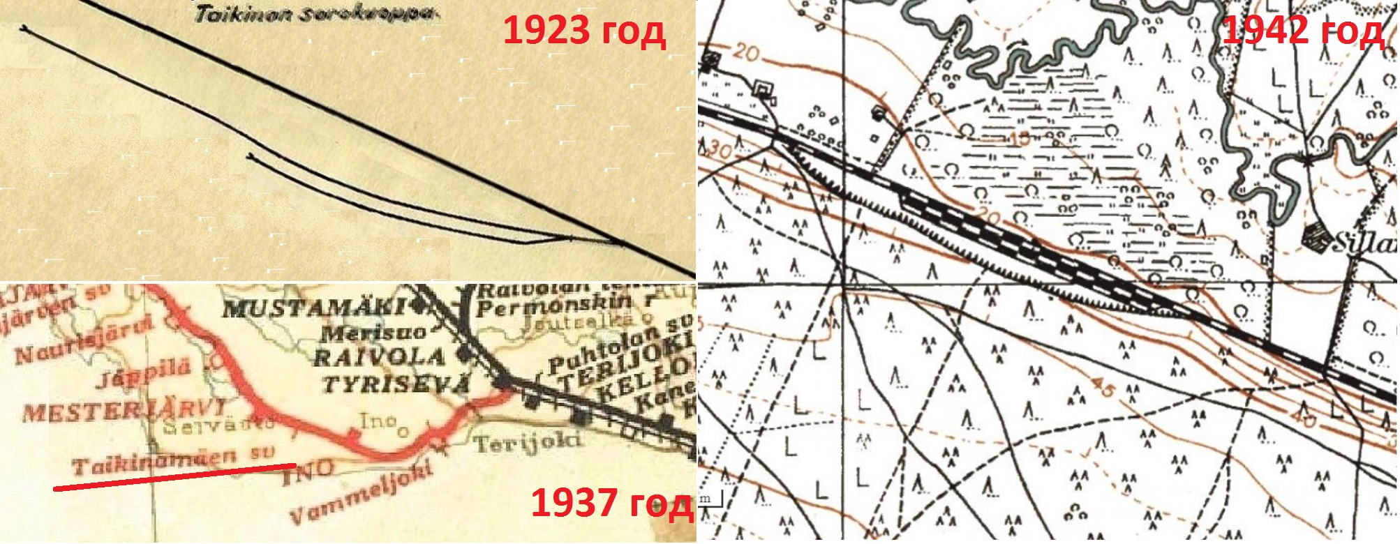 Карта-схема поста Тайкинамяки.